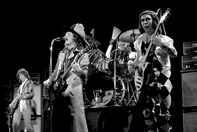 Slade, Chateau Neuf, Oslo, Norway